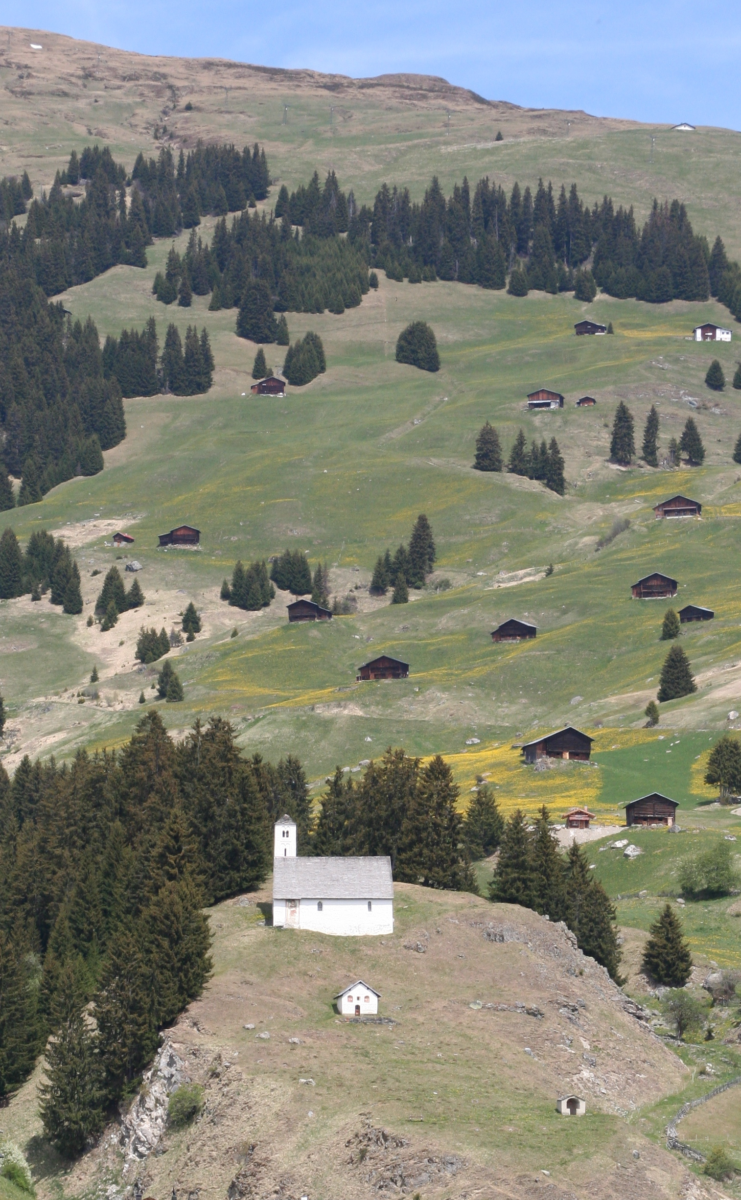 Kapelle St. Eusebius Kapelle Eusebius mit Kapelle St. Georg